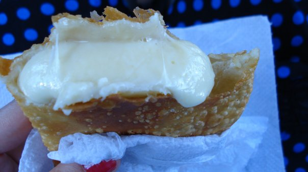 ricas empanadas de Huentelauquen